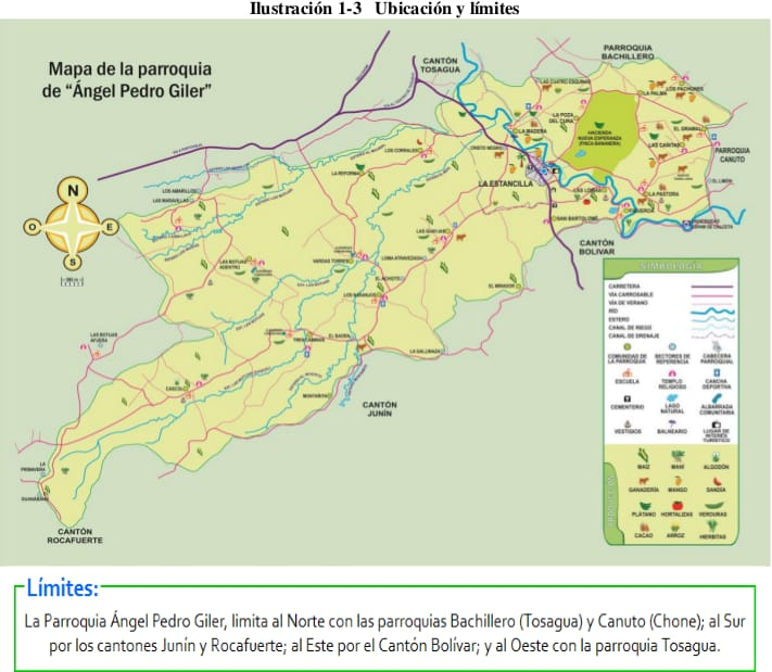 Division Politica de Angel Pedro Giler - La Estancilla